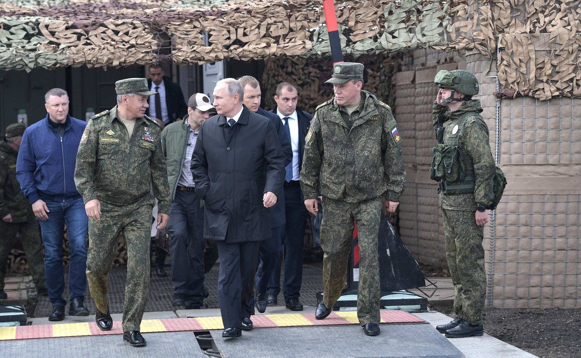 Основной этап манёвров «Восток-2018» на полигоне Цугол в Забайкальском крае.